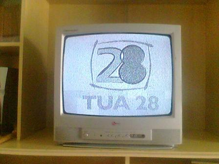 Imagem própria